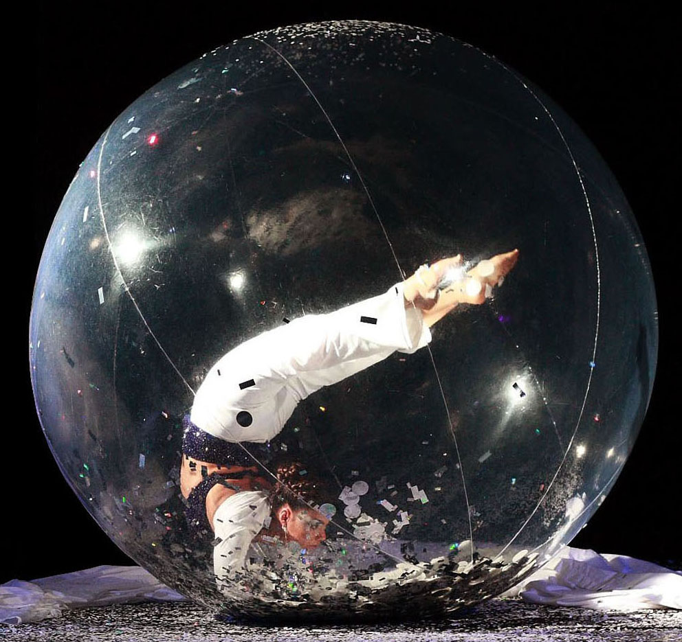 Elena contortionist en bulle